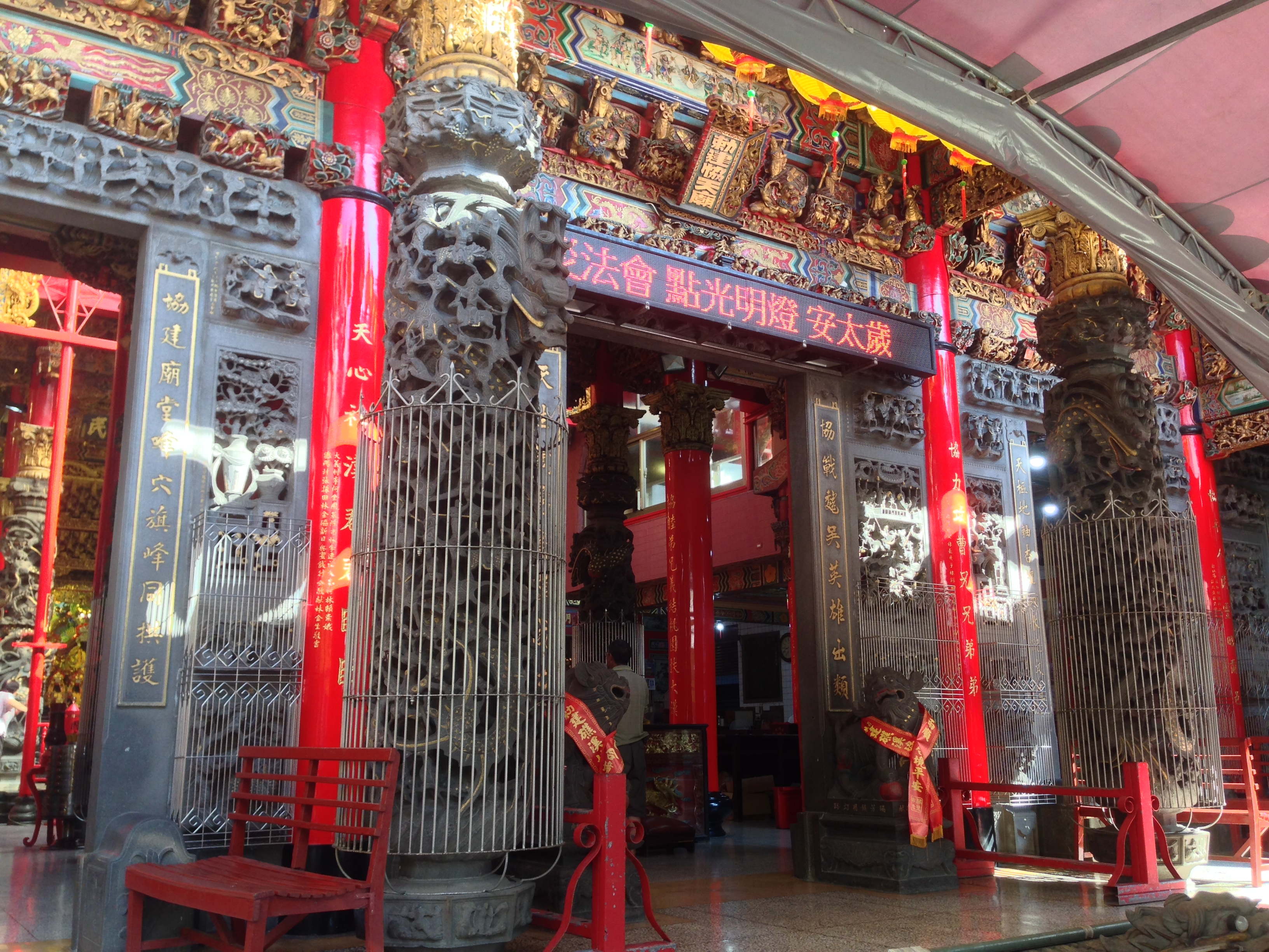 中文（台灣）: 礁溪協天廟門殿